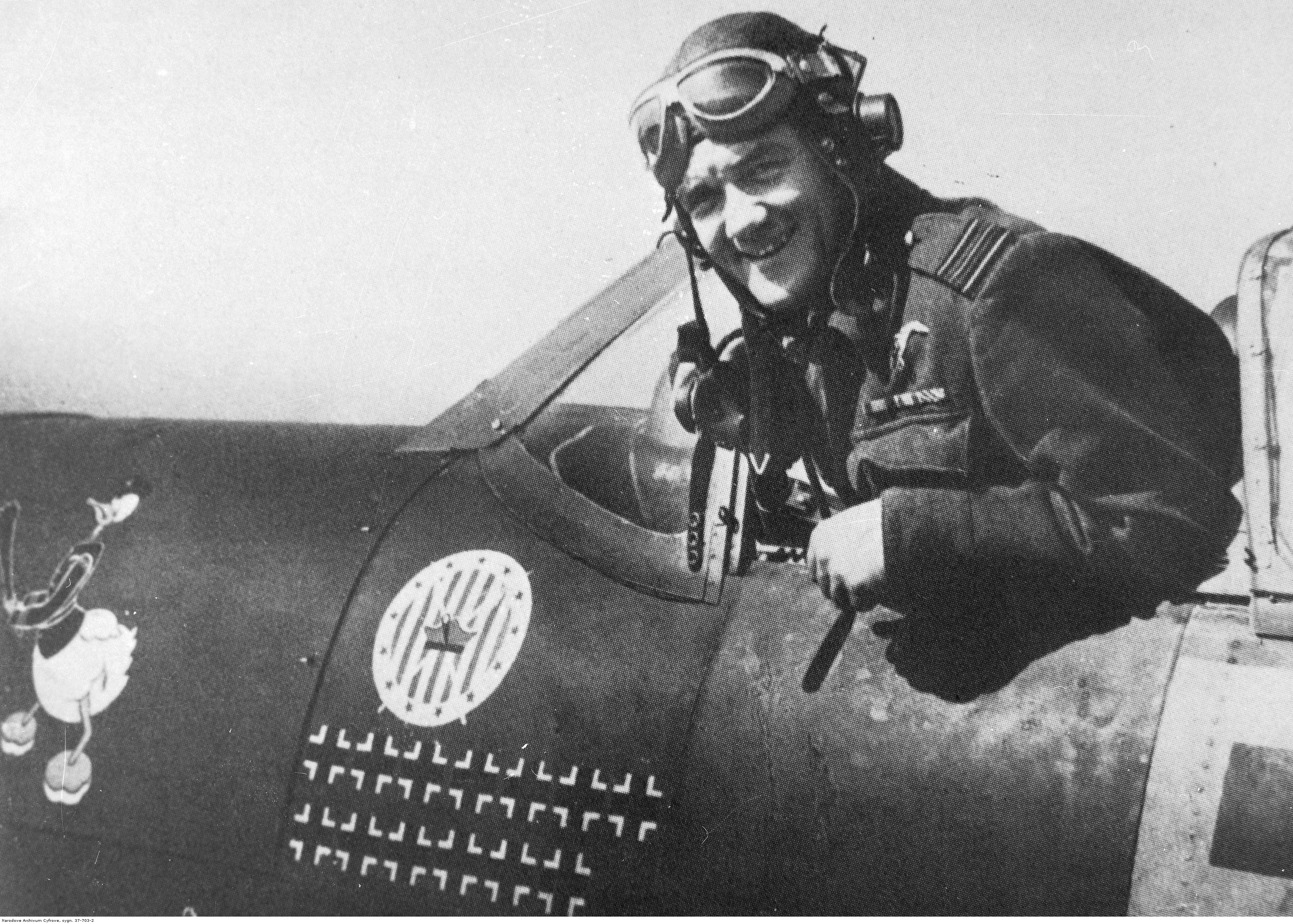 Jan Zumbach